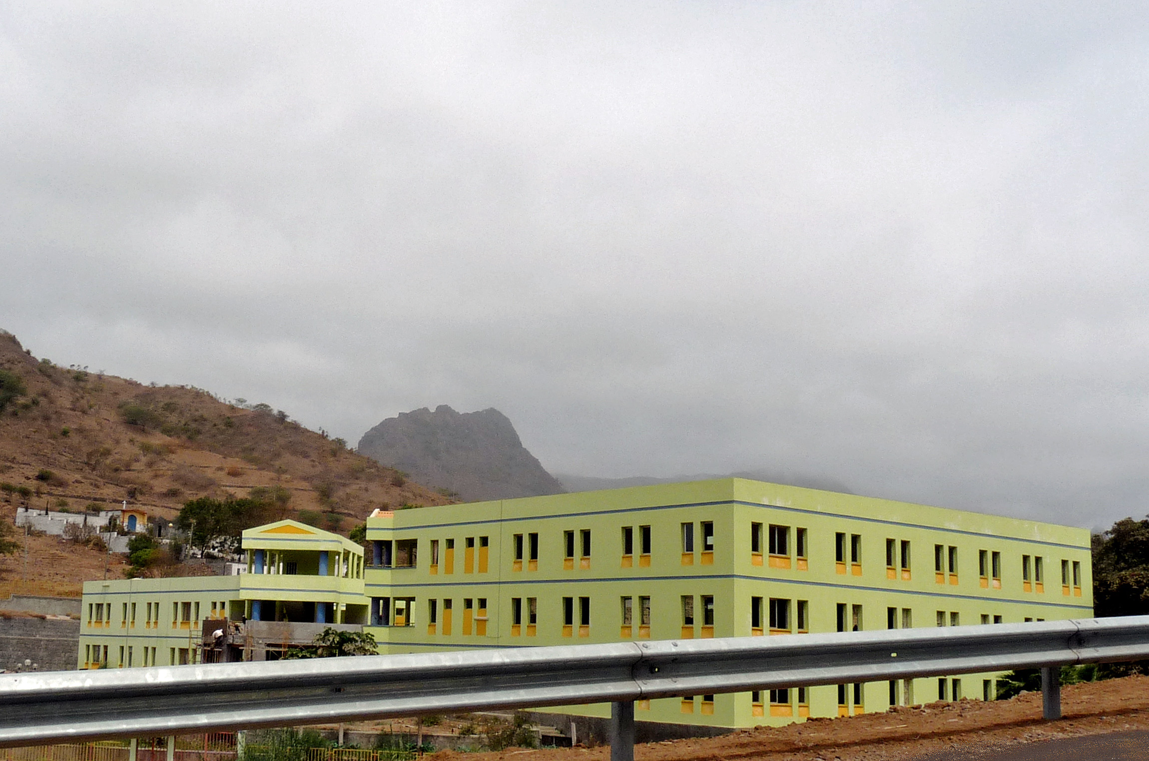 São Domingos, Ilha de Santiago - Cabo Verde (Escola_secundária_Fulgêncio_Tavares)